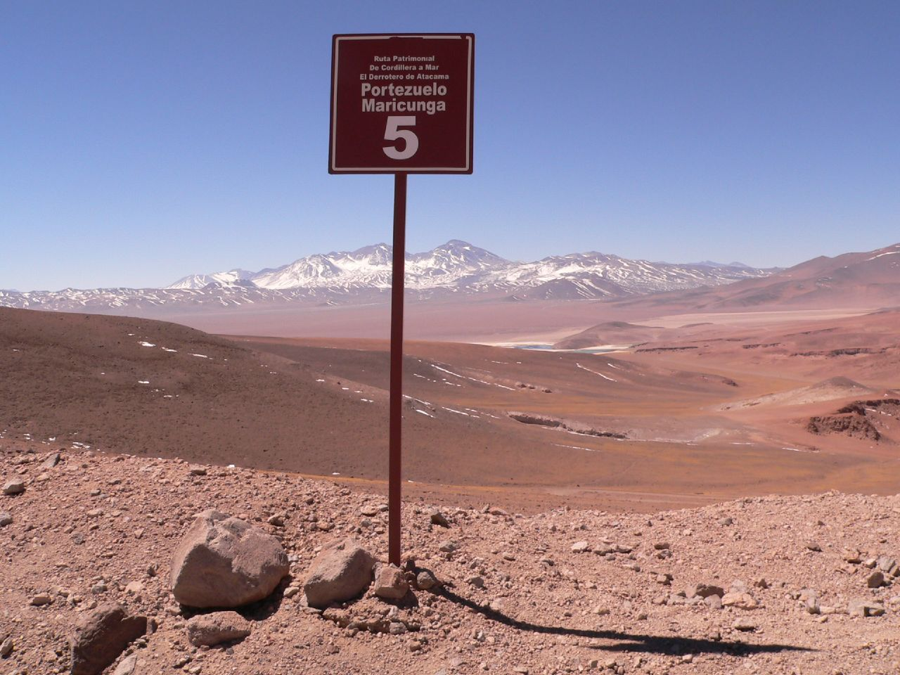 Nevado Tres Cruces, Argentina/Chile border.